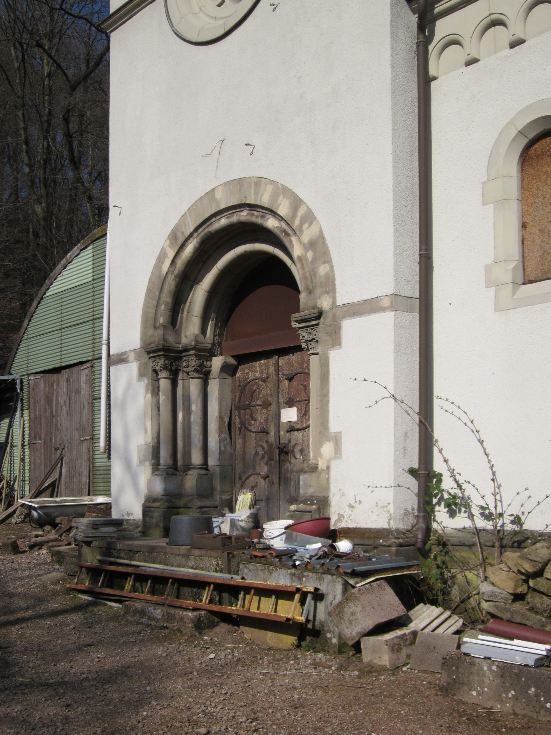 Stummsche Kapelle am Halberg (Saarbrücken)